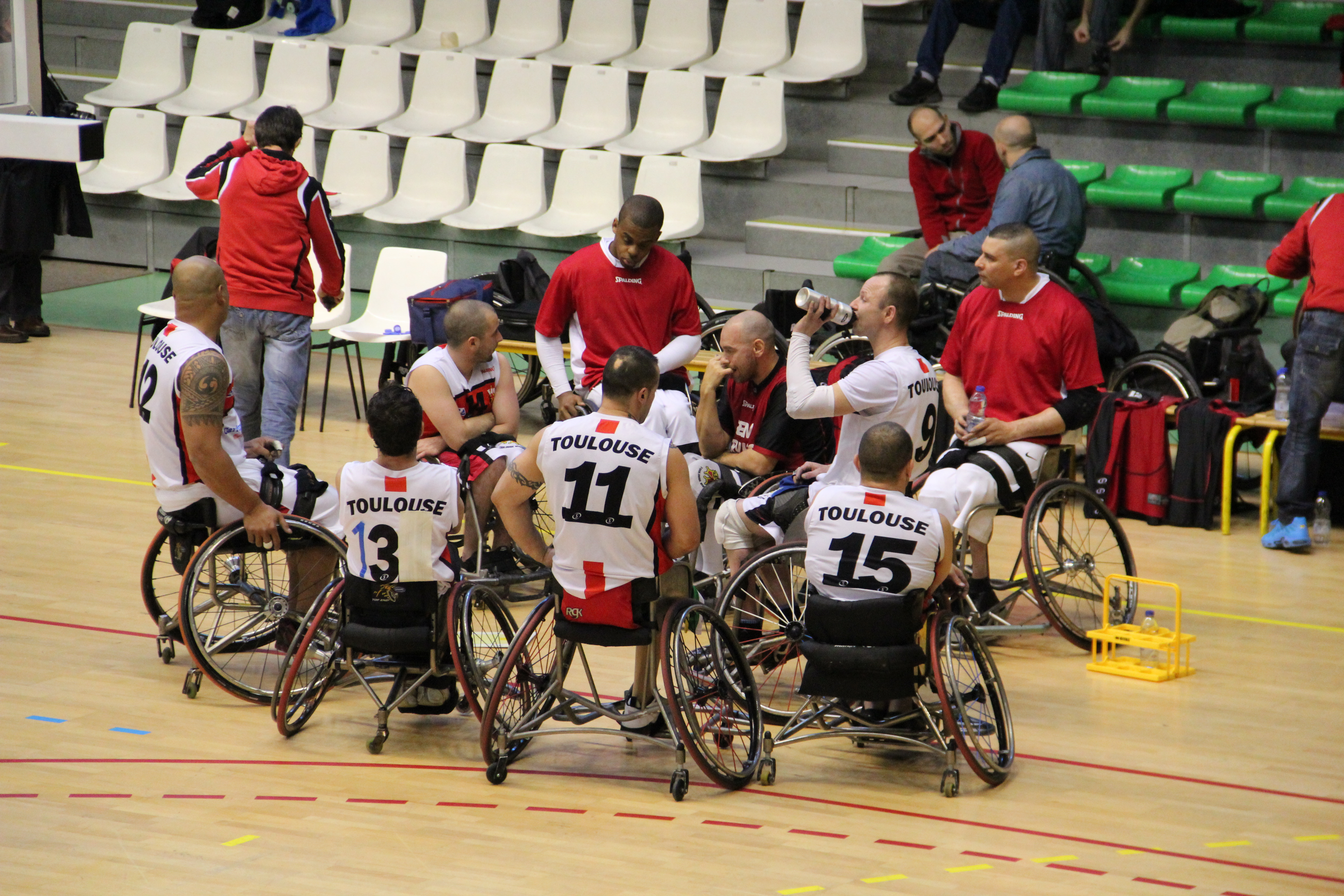 Euroleague — 9 March 2012, Palais des sports André-Brouat, Toulouse. Match between: Toulouse IC — USC Munich Équipe de Toulouse IC à la mi-temps.